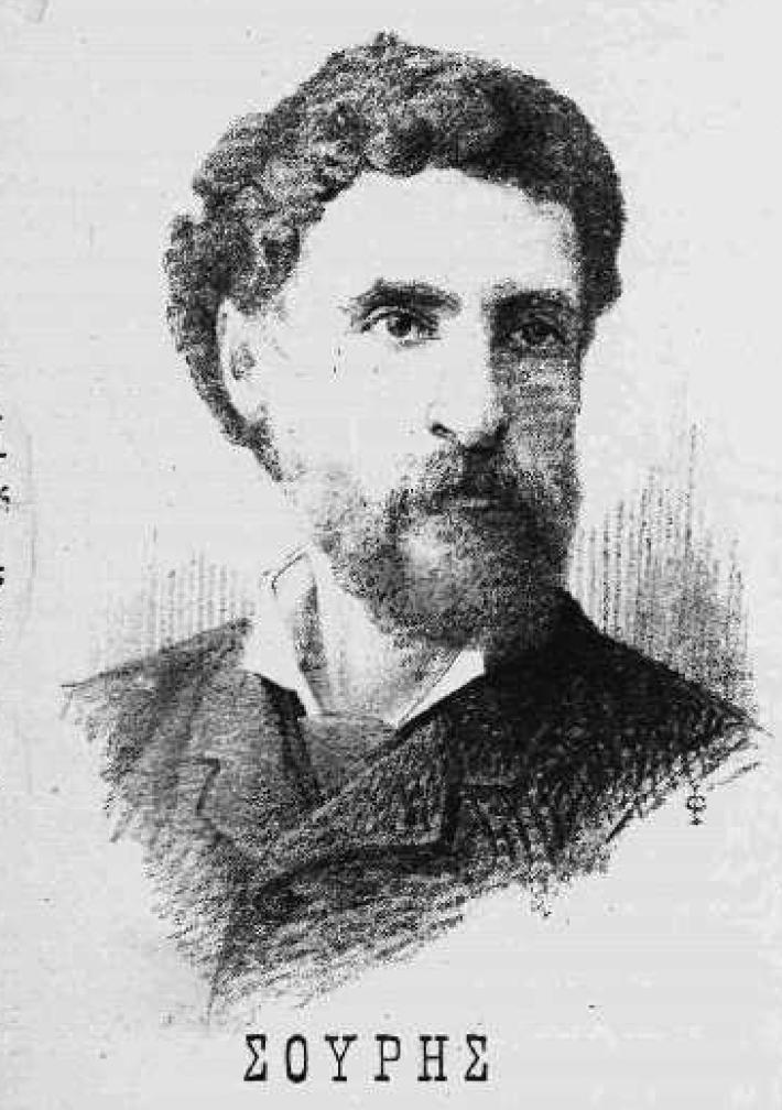 griechischer Dichter, 19. Jahrhundert